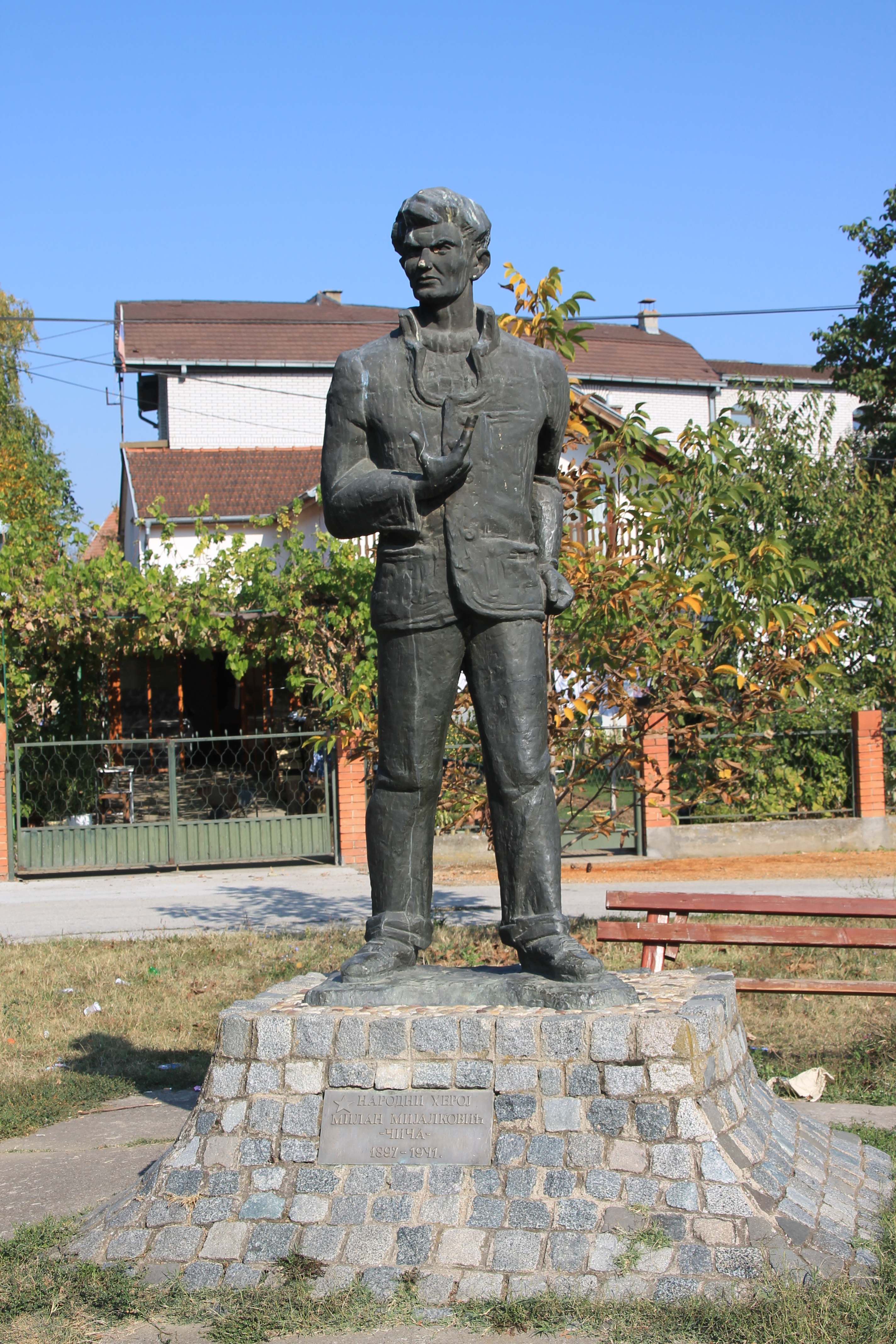 Vinorača